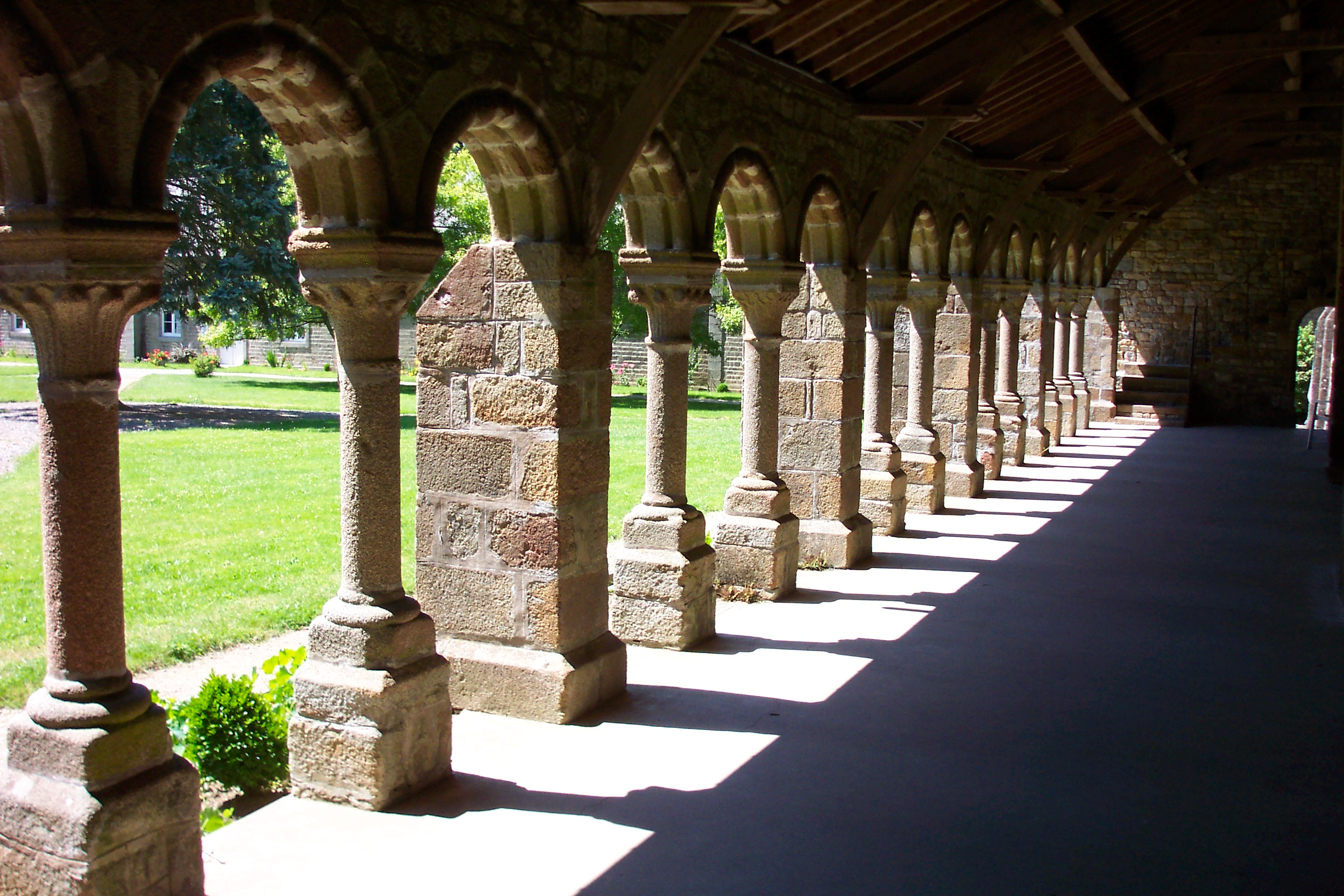 photographie du cloître de l'Abbaye blanche de Mortain